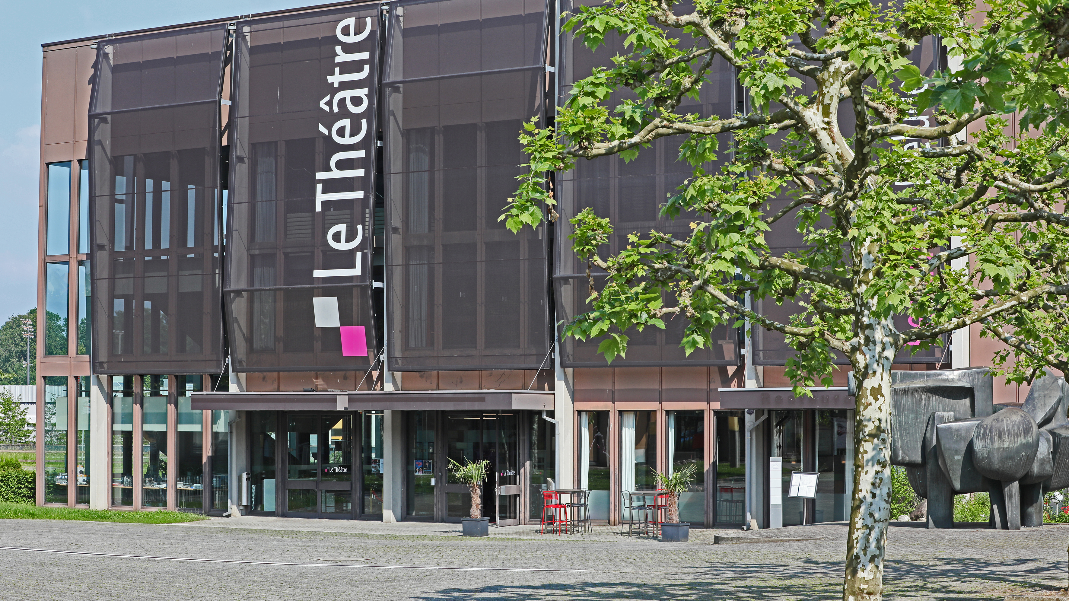 Das Kulturhaus im Frühling 2018